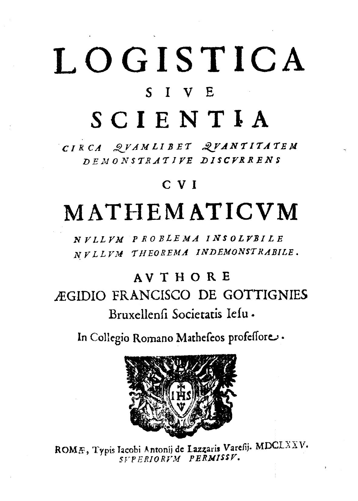 Logistica siue Scientia circa quamlibet quantitatem demonstratiue discurrens cui mathematicum nullum problema insolubile nullum theorema indemostrabile. Authore Aegidio Francisco de Gottignies Bruxellensi Societatis Iesu. .... - Romae : typis Iacobi Antonij de Lazzaris Varesij, 1675. - [12], 98, [2], 19, [1] p. ; 4º .